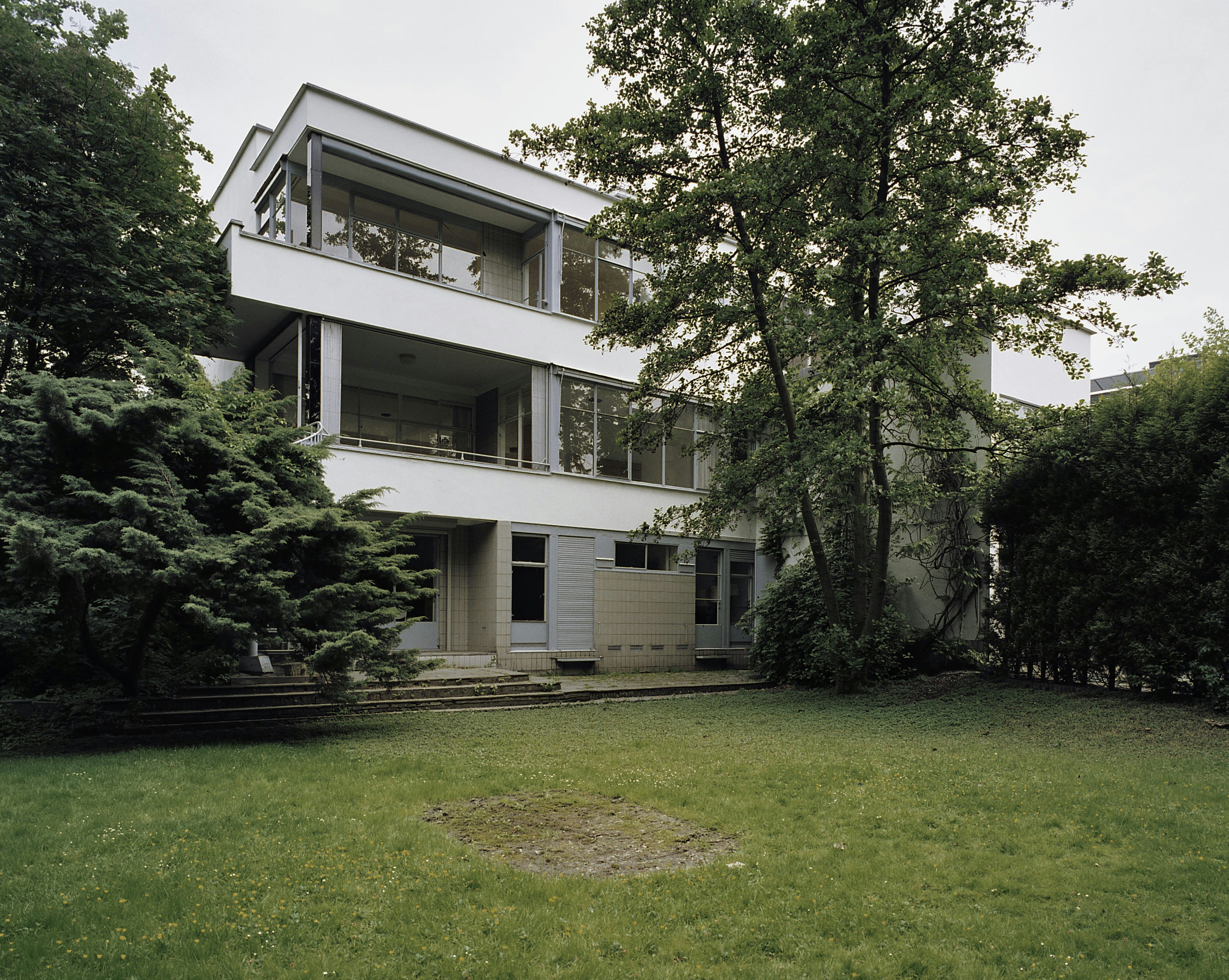 Huis Sonneveld: Exterieur overzicht achterzijde (oostgevel) (opmerking: Bij publicatie is toestemming nodig van Buro vd Broek & Bakema (tel.: 010-4134780))